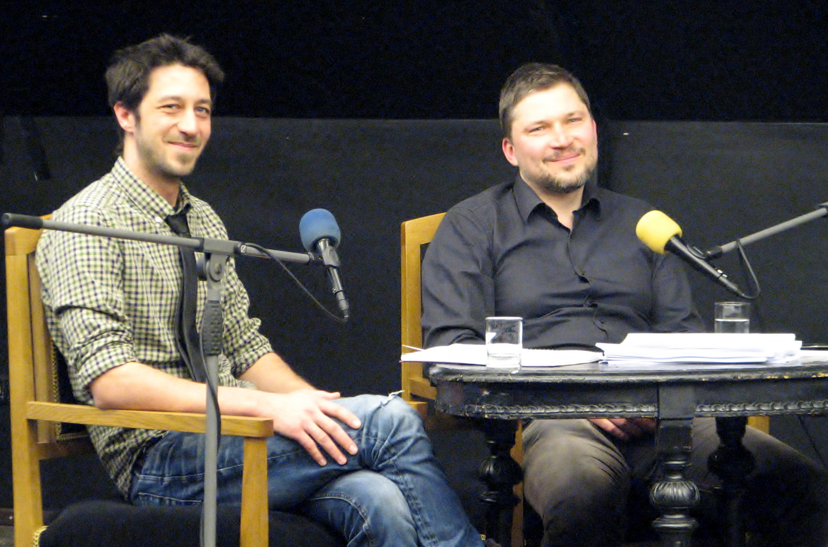 Eesti tõlkijad Adam Cullen (vasakul) ja Martin Algus esinemas üritusel "teater/keel" Eesti Draamateatri maalisaalis